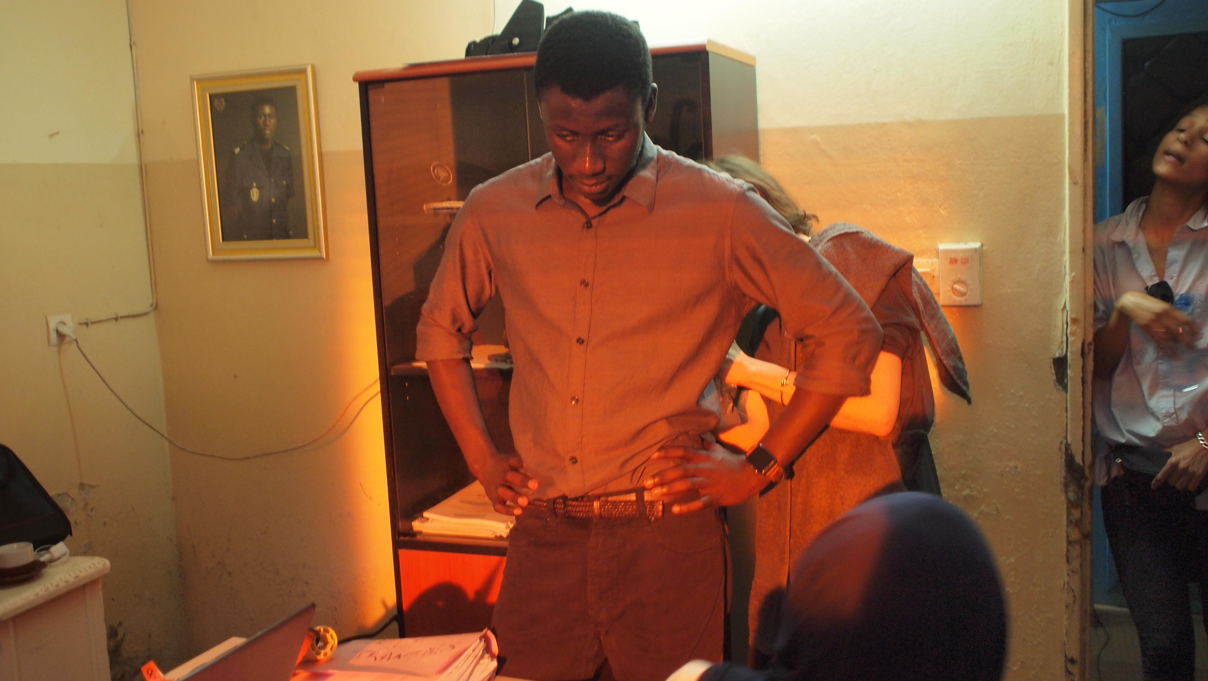 Photo prise lors du tournage du film de Mati Diop, Atlantique